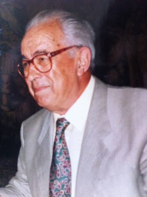 Denis BOUBALS, Professeur de Viticulture/Oenologie à l'ENSAM et Directeur de Recherche à l'INRA